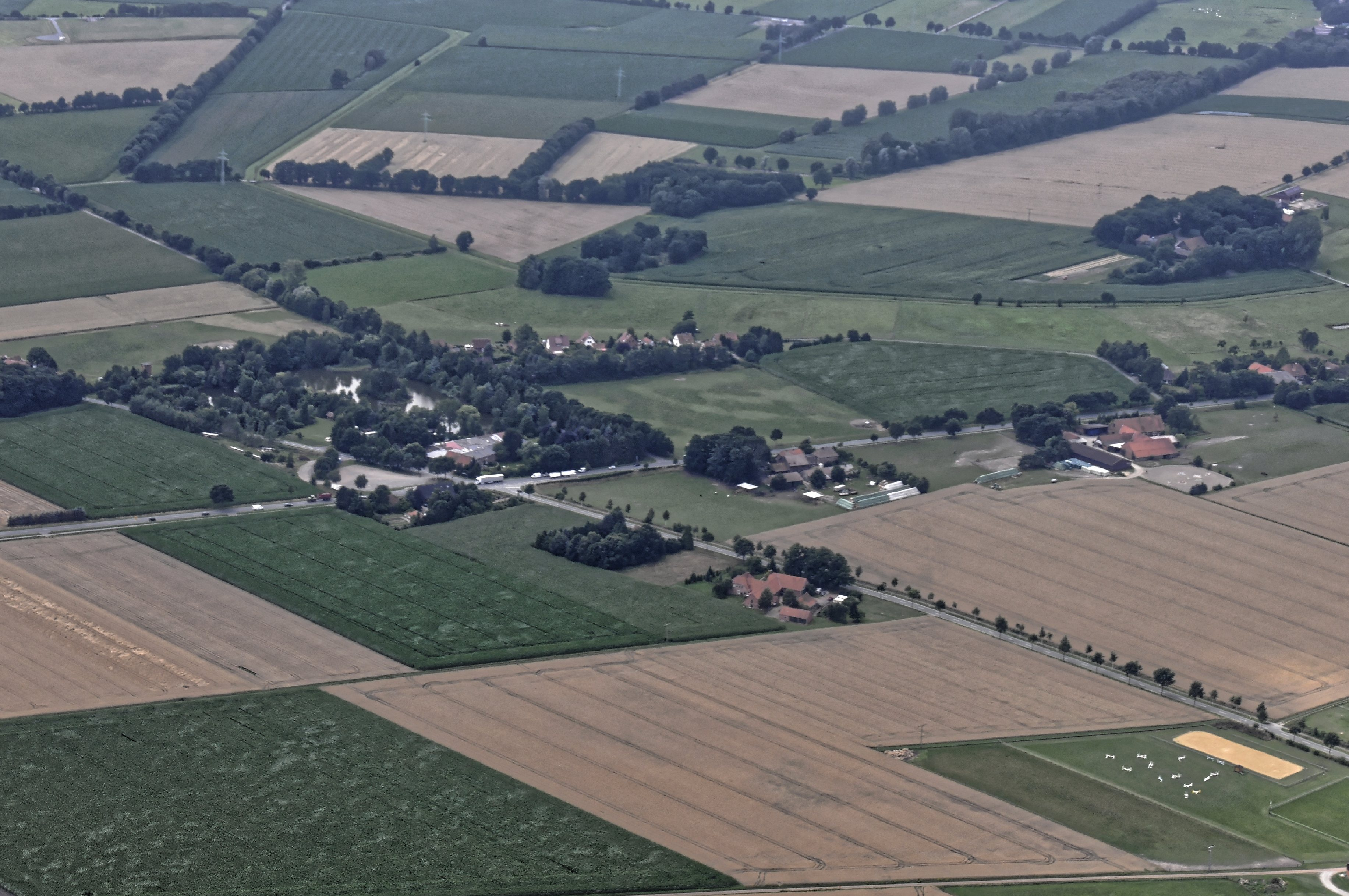 Bilder vom Flug Nordholz-Hammelburg 2015: Blick von Osten auf das zu Maasen gehörende Hotel Seehof an der die B 214 (von links nach rechts) kreuzenden Ölstraße (von rechts unten nach links).